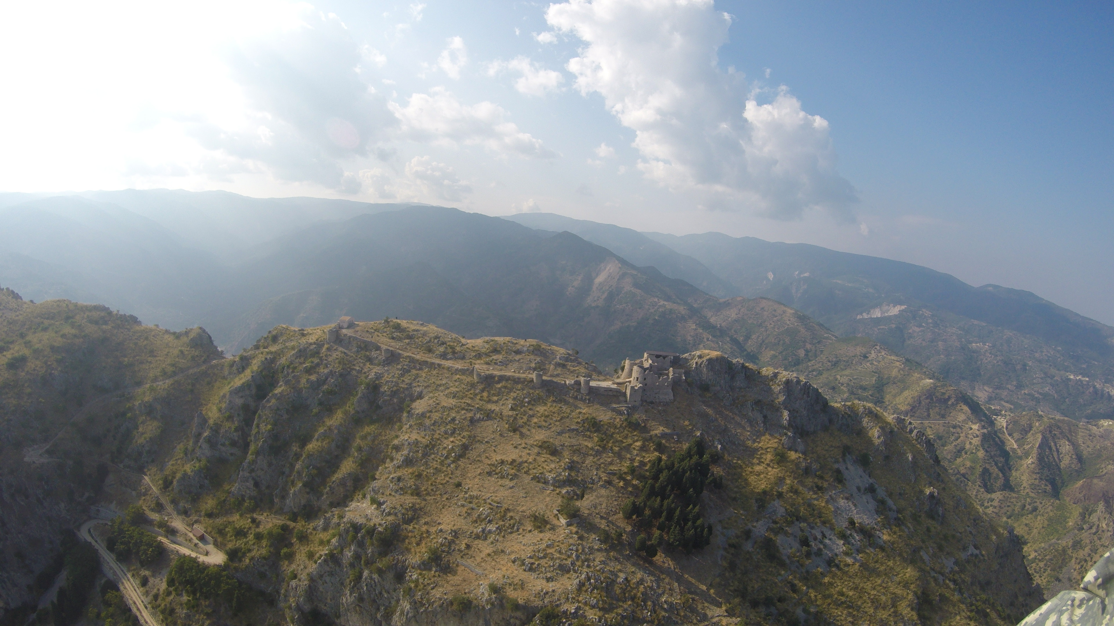 Castello Normanno di Stilo in volo dall'alto (Agosto 2016) Lato del monte rivolto verso il mare